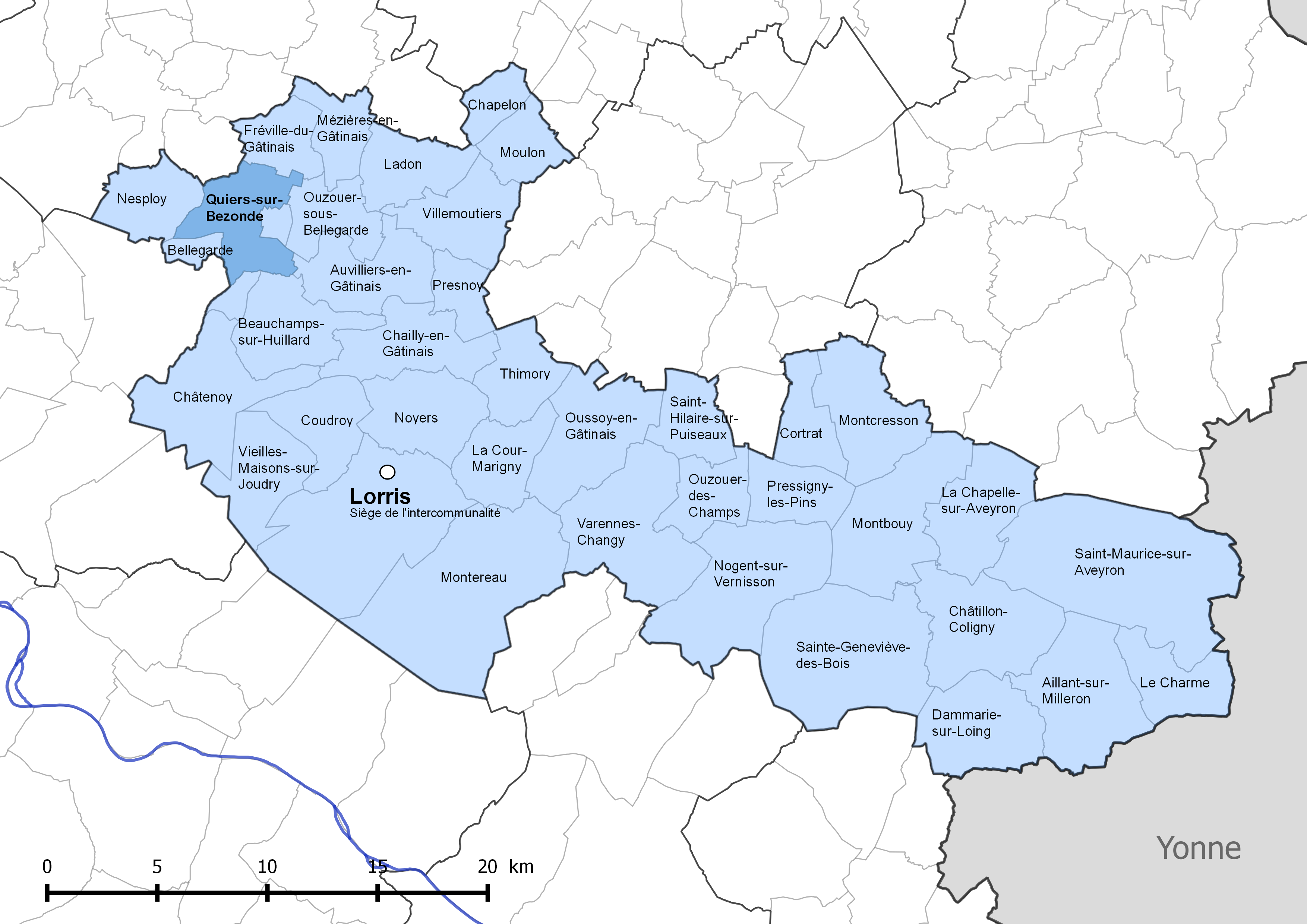 Périmètre de la communauté de communes Canaux et forêts en Gâtinais - Situation de la commune de Quiers-sur-Bezonde.